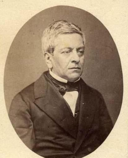 Manuel Montt (1809-1888). Presidente de Chile (1851-1861).